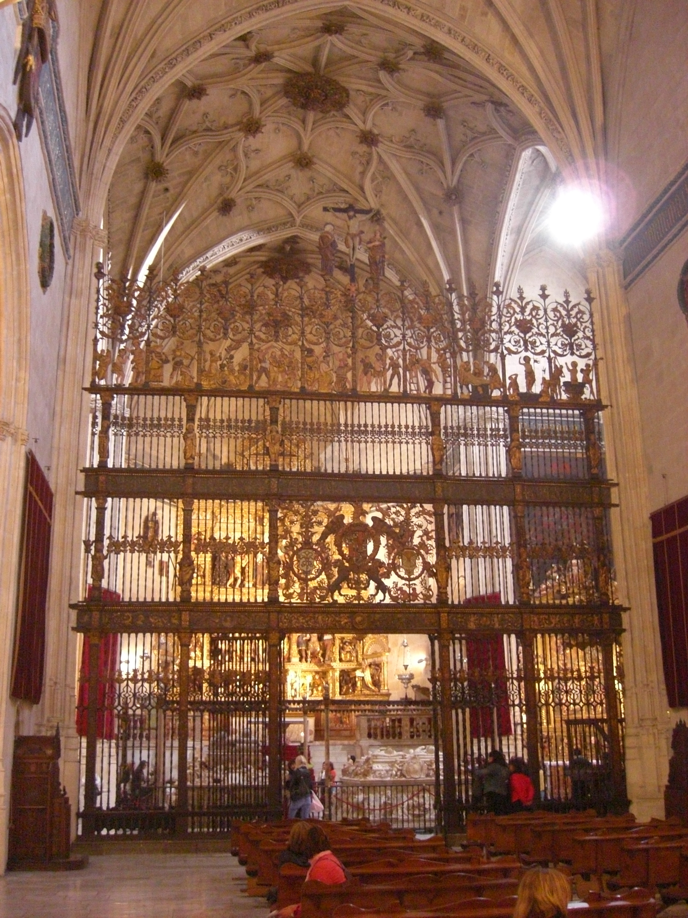 Vista general de la Capilla Real de Granada, (España).